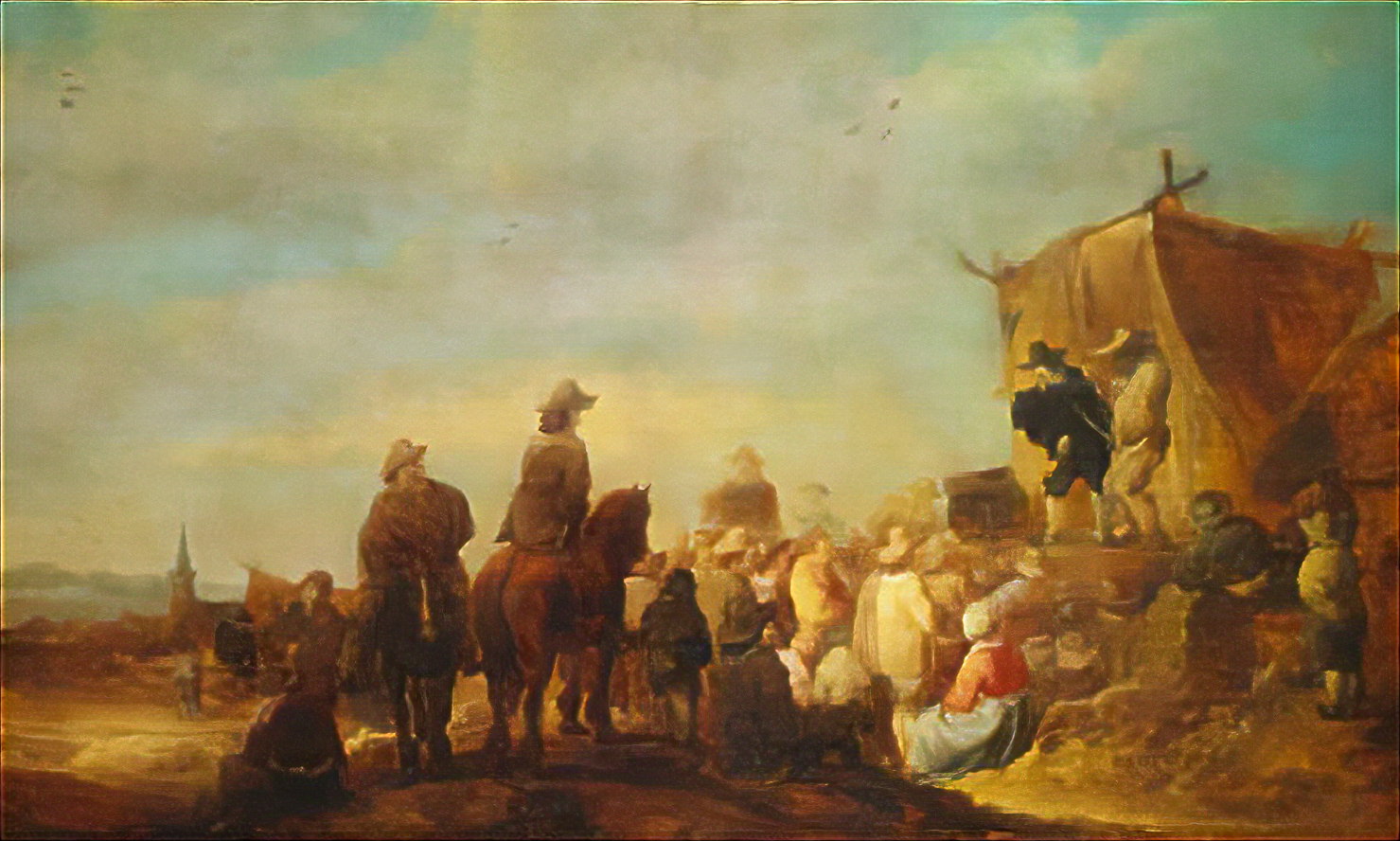 Wanderschausteller